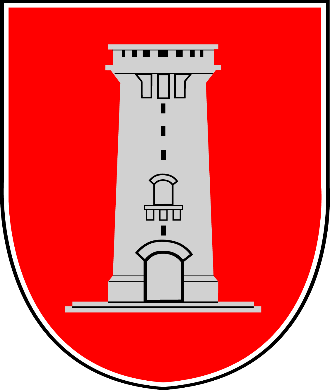 Wappen der Gemeinde Wölpinghausen